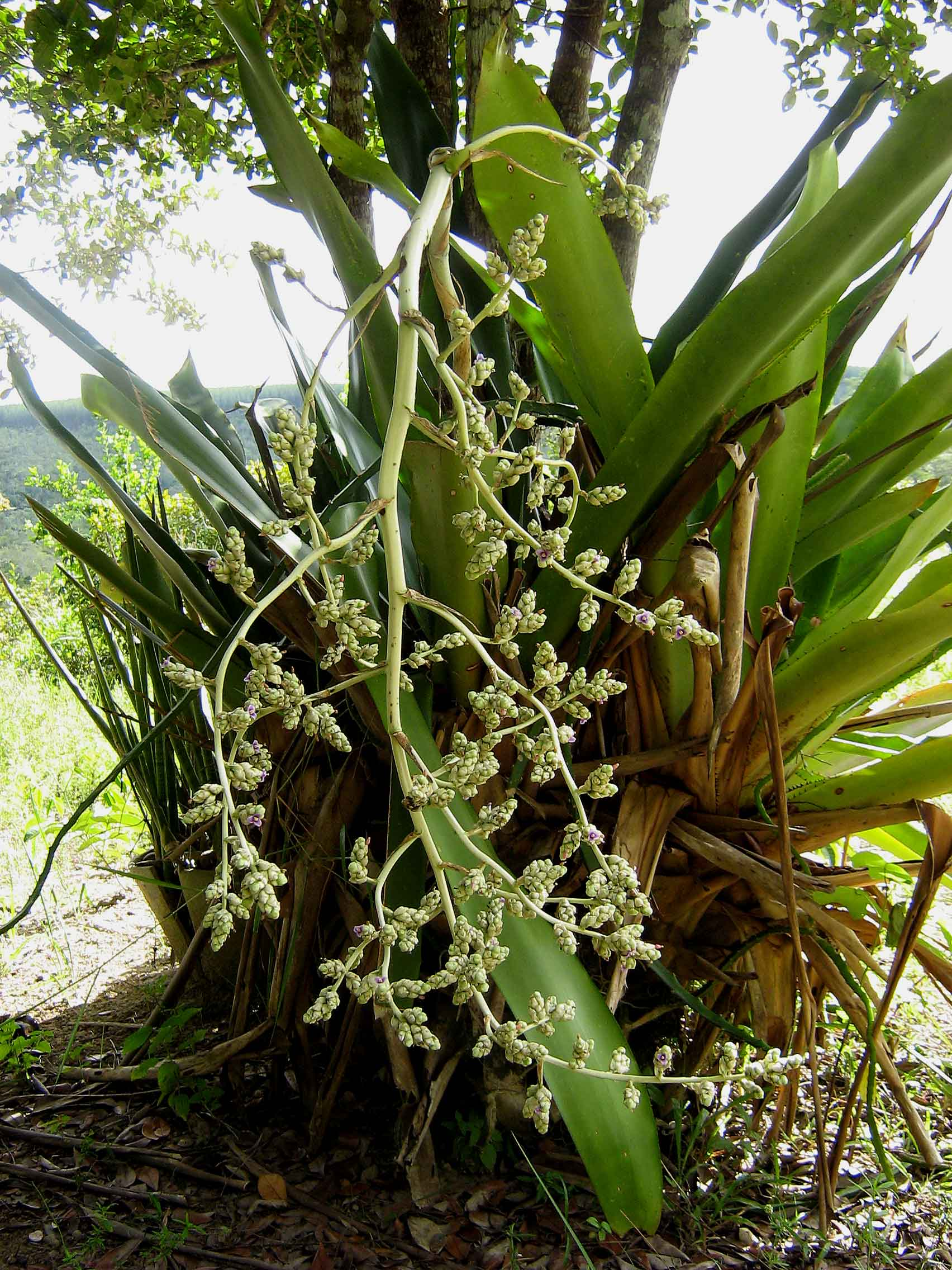 Hohenbergia blanchetii (Baker) E.Morren ex Mez